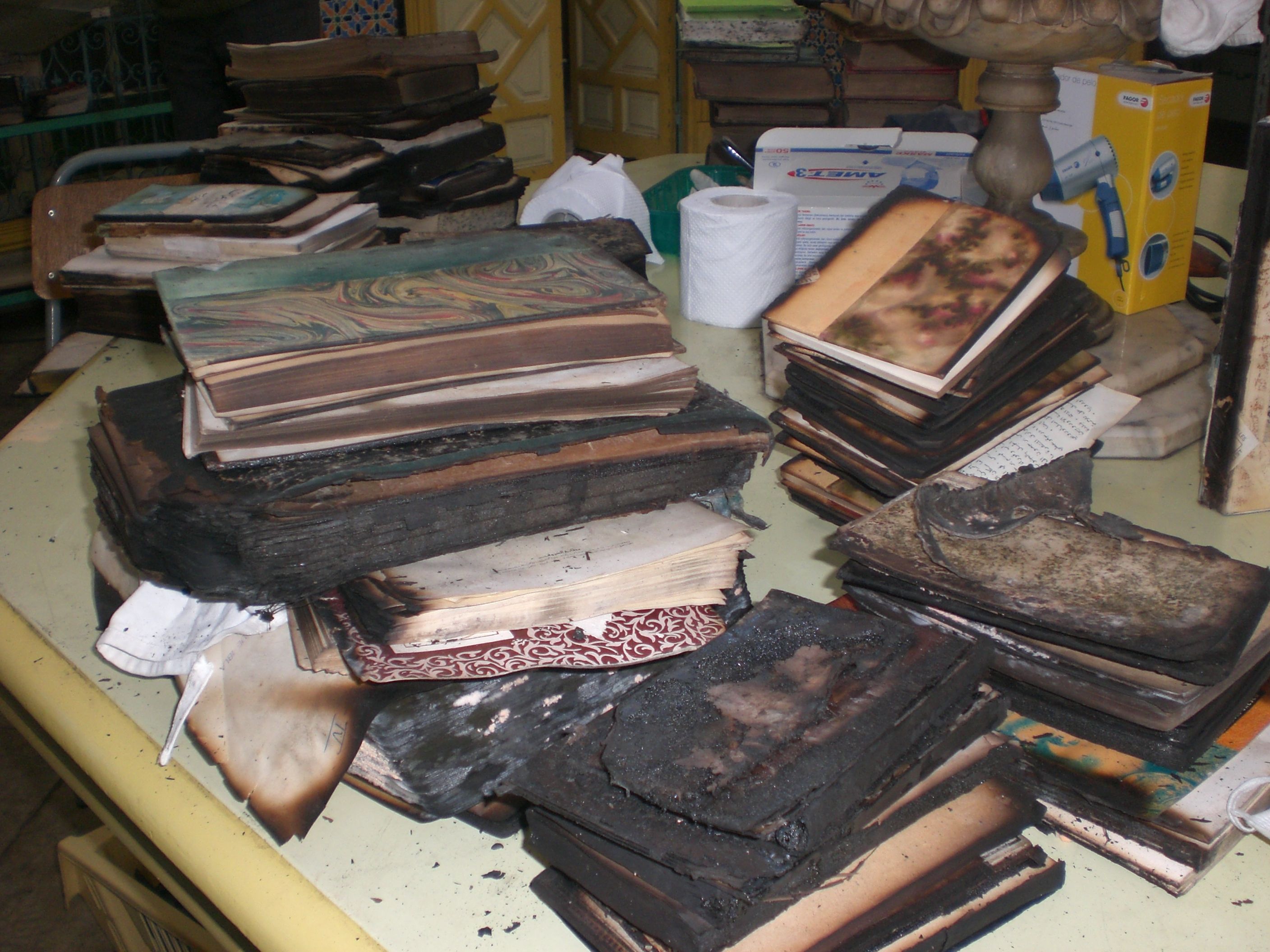 Incendie de la bibliothèque IBLA-Tunis